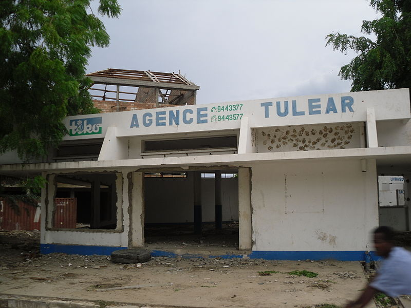 Tiko di Tulear marzo 2009a